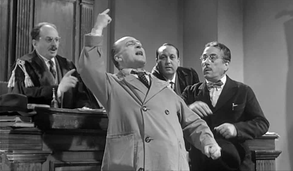 Screenshot del film La cambiale, 1959, regia di Camillo Mastrocinque